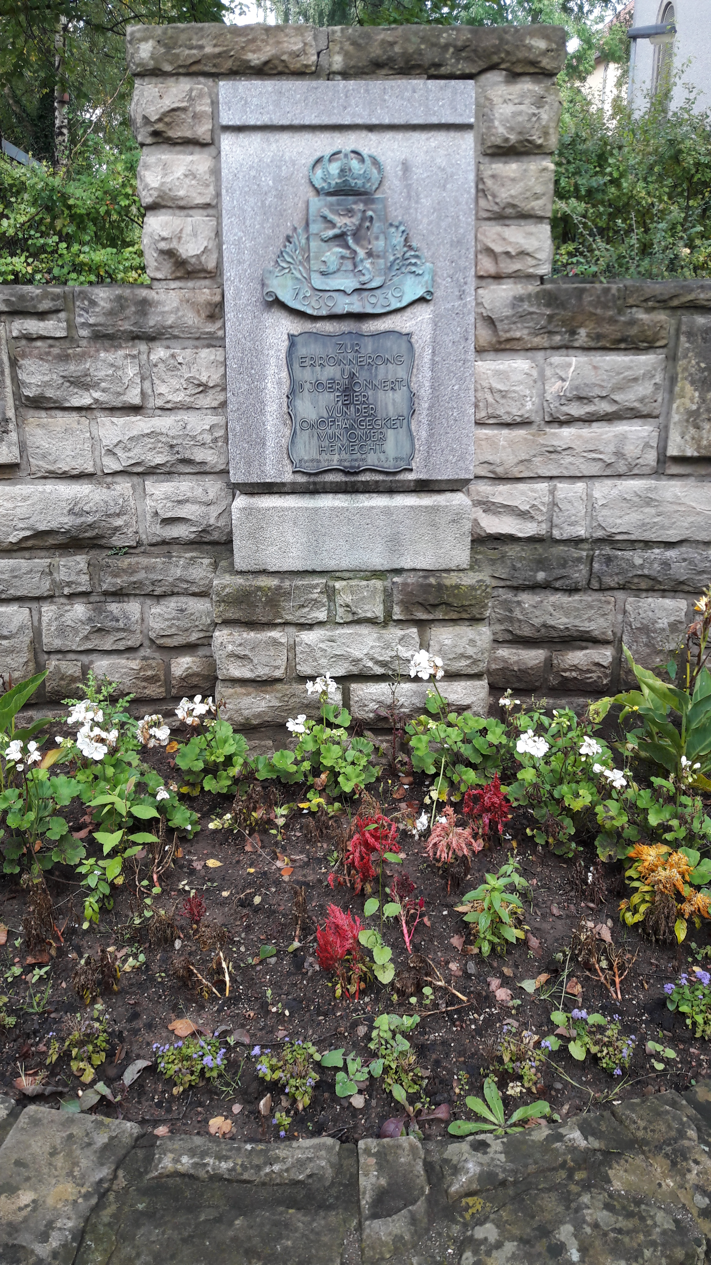 Erënnerungsplakett aus dem Joer 1939 un ďOnofhängegkeet vun 1839. Se steet niewend der Kierchbierger Kierch an der rue des Maraîchers.